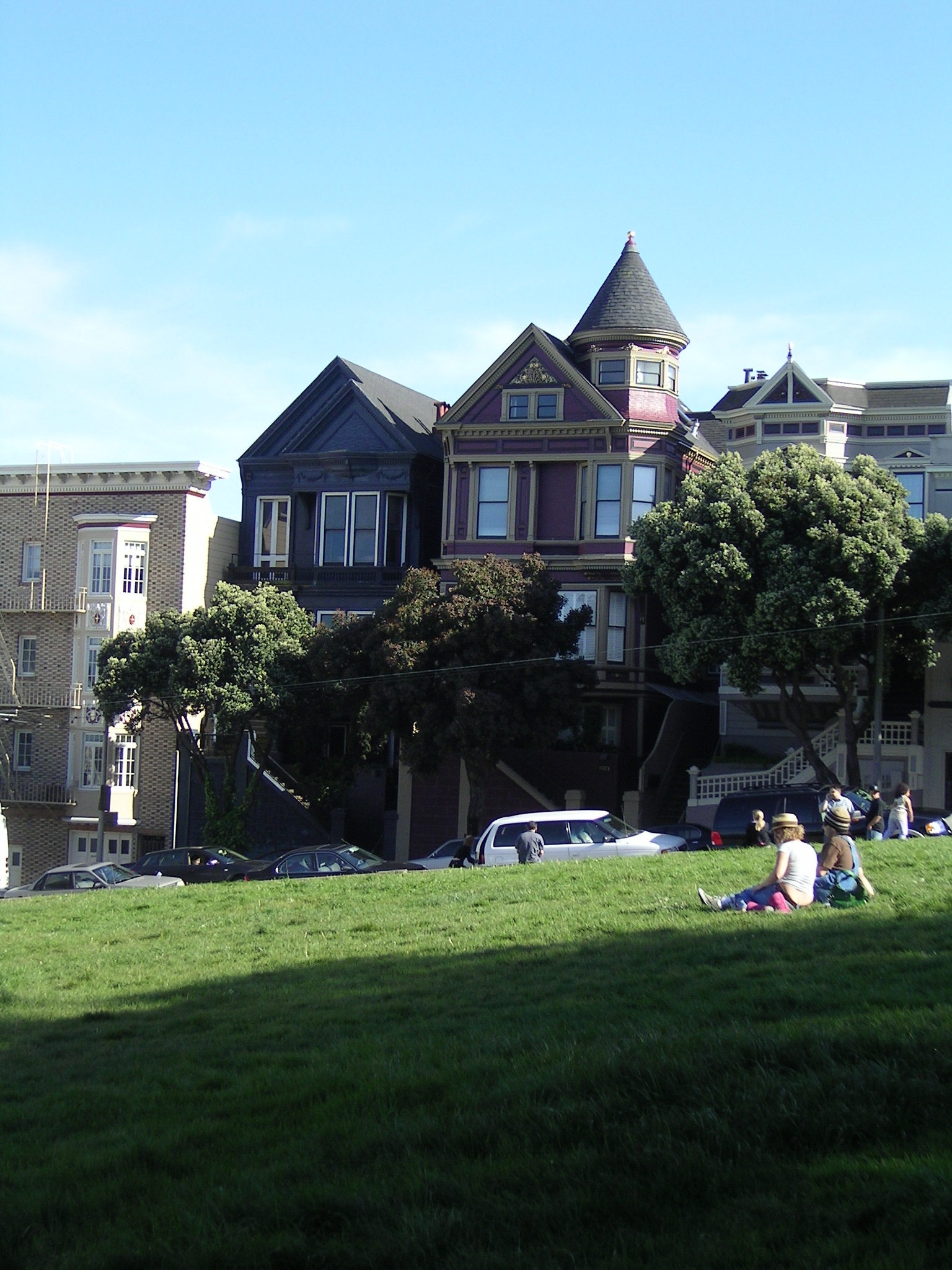 San Francisco, California : Alamo Square